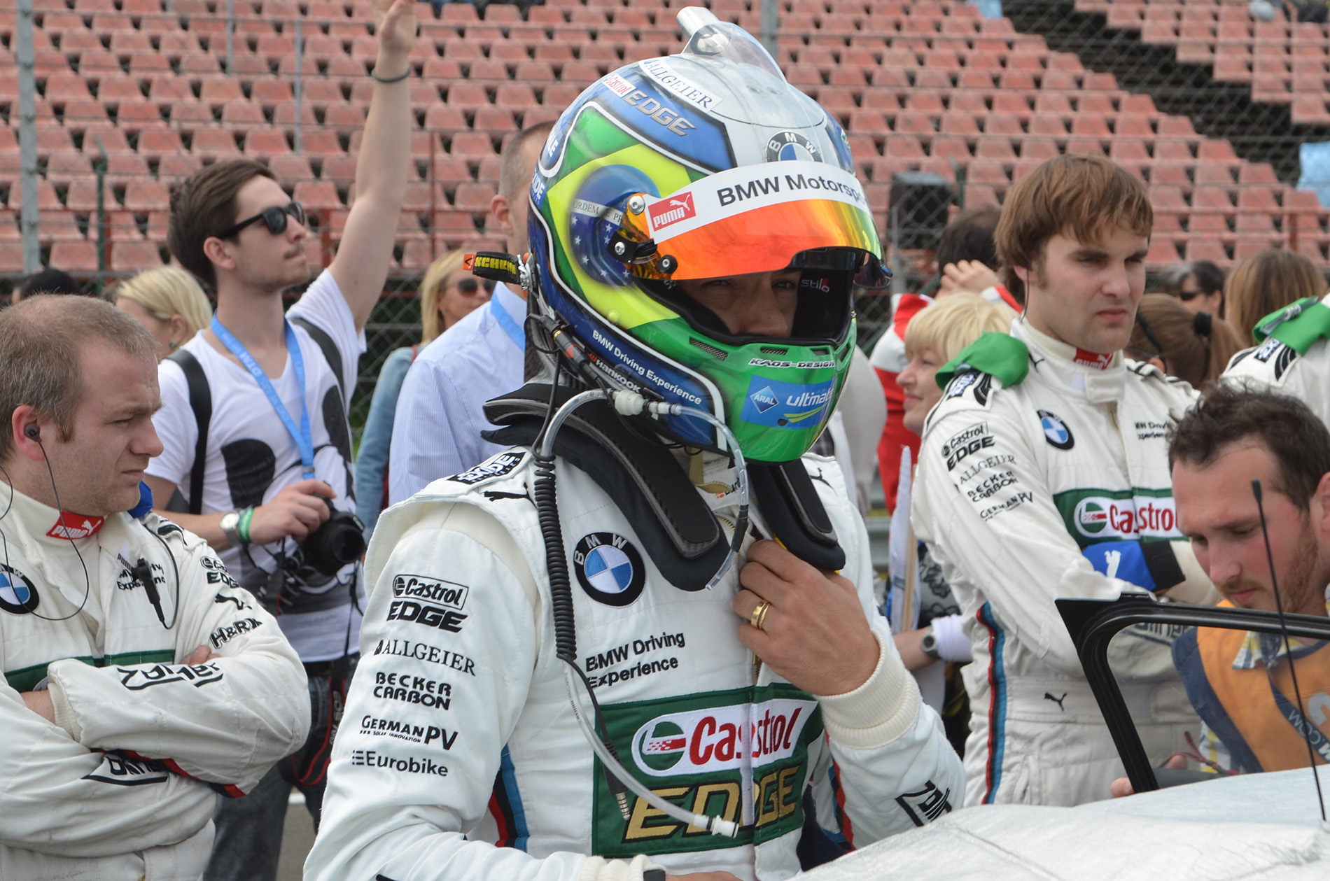 Augusto Farfus a DTM 2014-es magyar futama előtt.